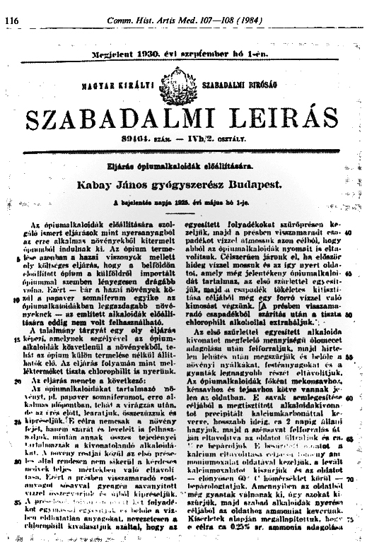 Szabadalom